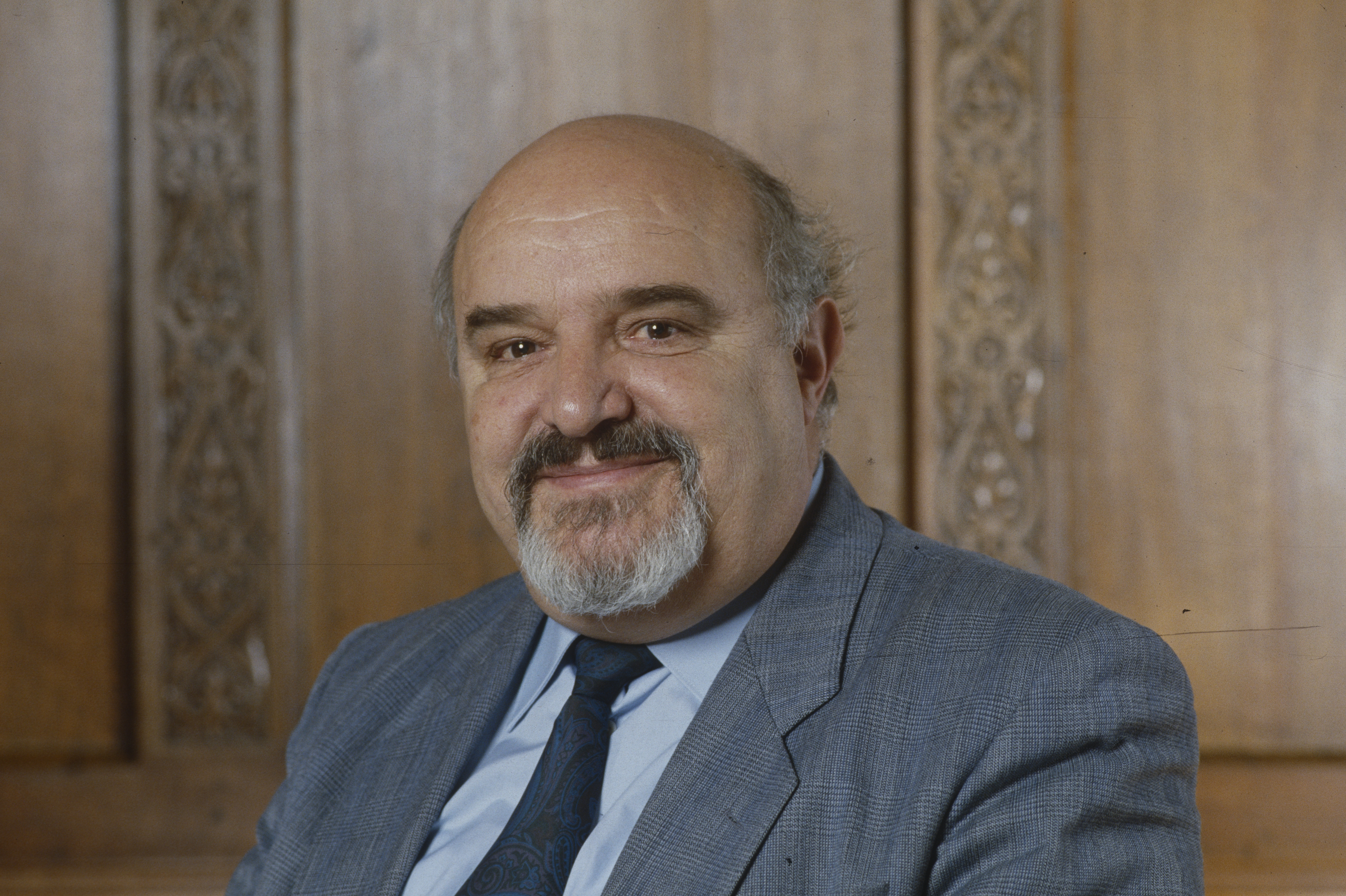 Hans-Rudolf Striebel (* 1930), Basler Regierungsrat (FDP, 1984–1995)